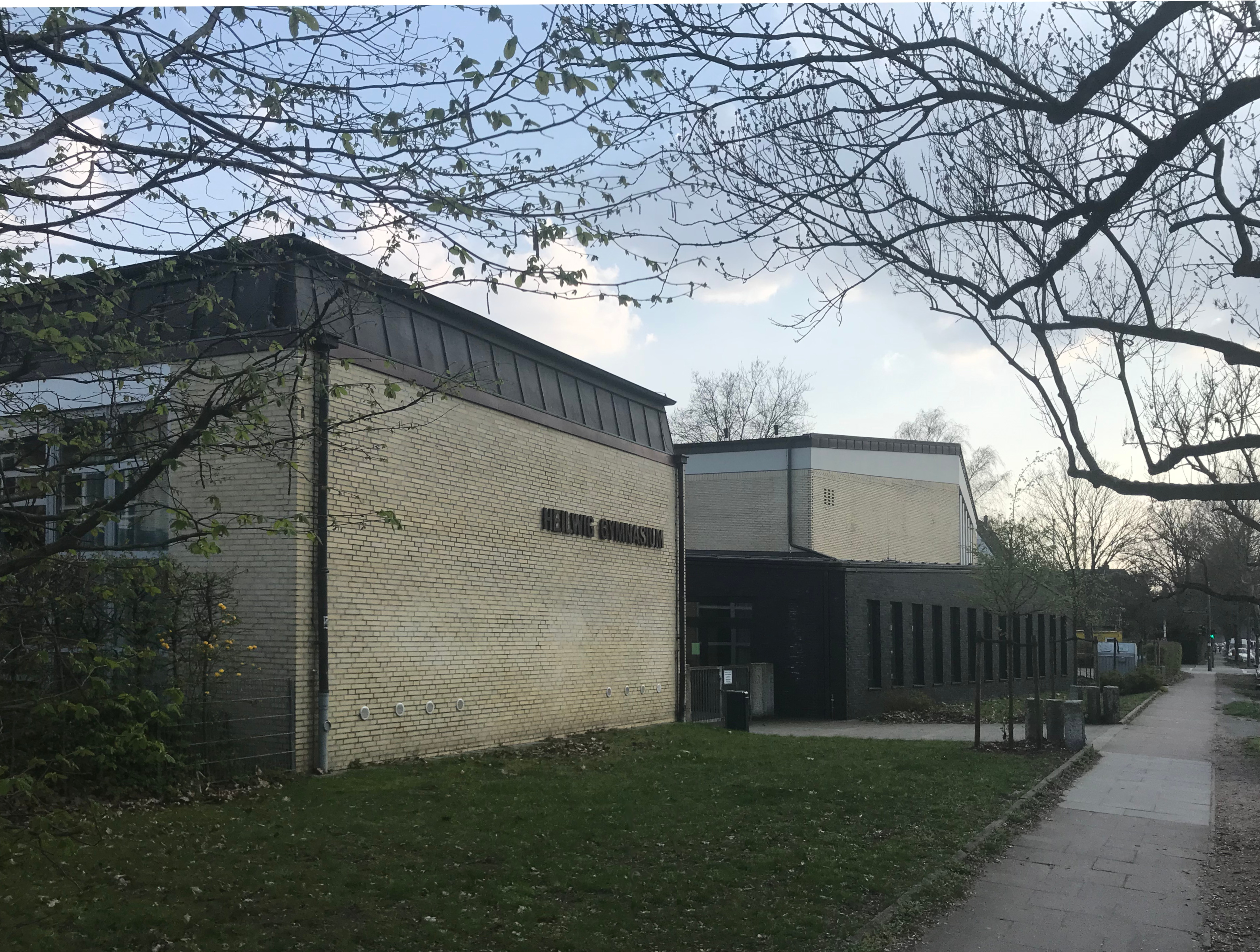 Heilwig-Gymnasium, Ansicht von der Bebelallee